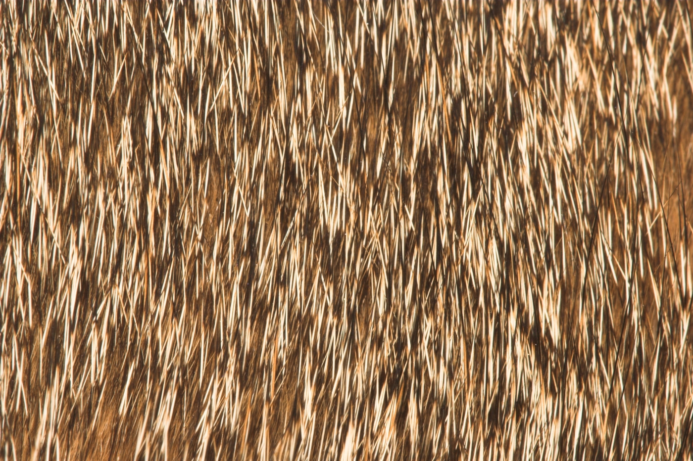 Makroaufnahme des Fells einer wildfarbenen Abessinierkatze mit Ticking